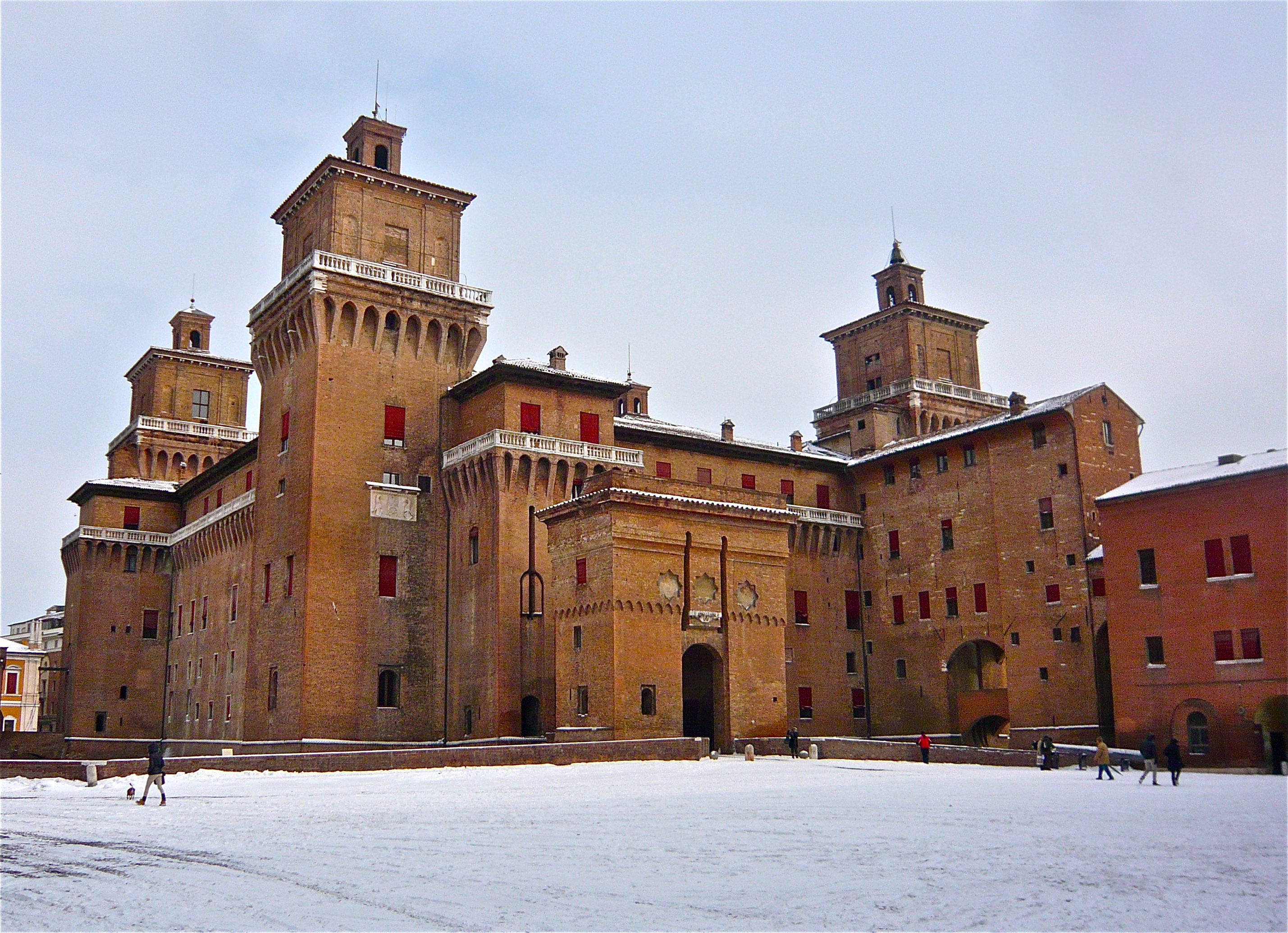 Fotografia del celebre Castello Estense (dedicato all'Arcangelo Michele) durante le forti nevicate relative all'inverno 2012 (la foto si riferisce precisamente al mese di febbraio). This is a photo of a monument which is part of cultural heritage of Italy.